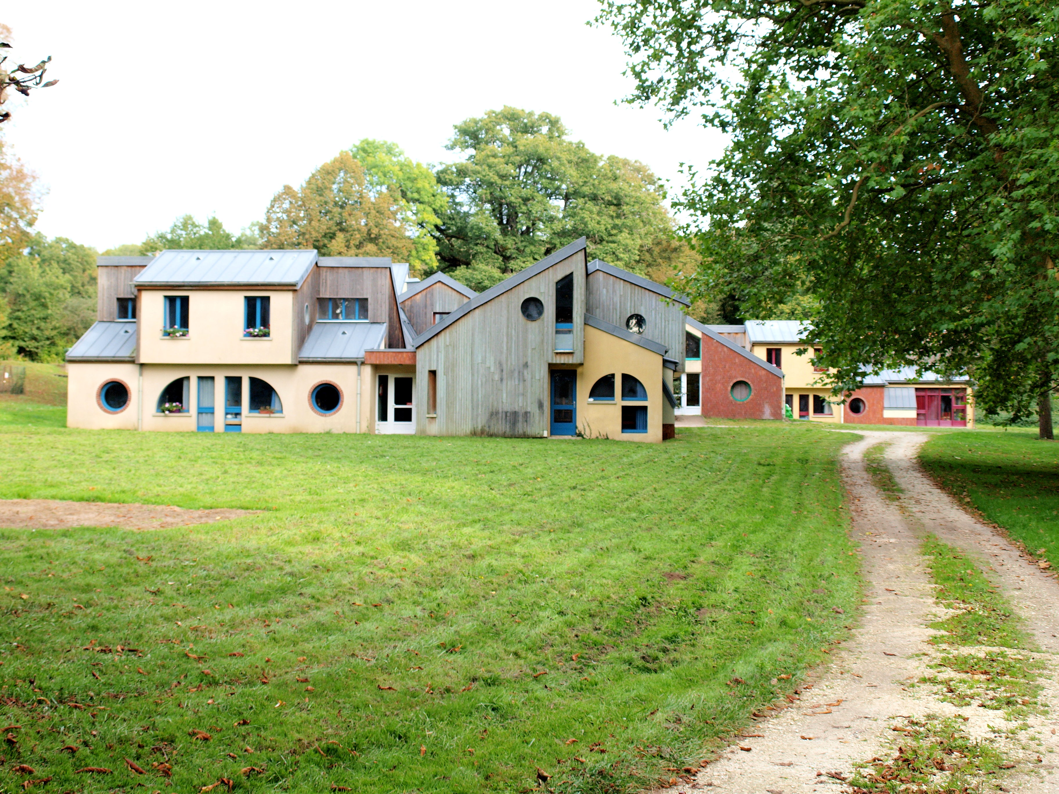 Château de Tannerre-en-Puisaye (Yonne, France)